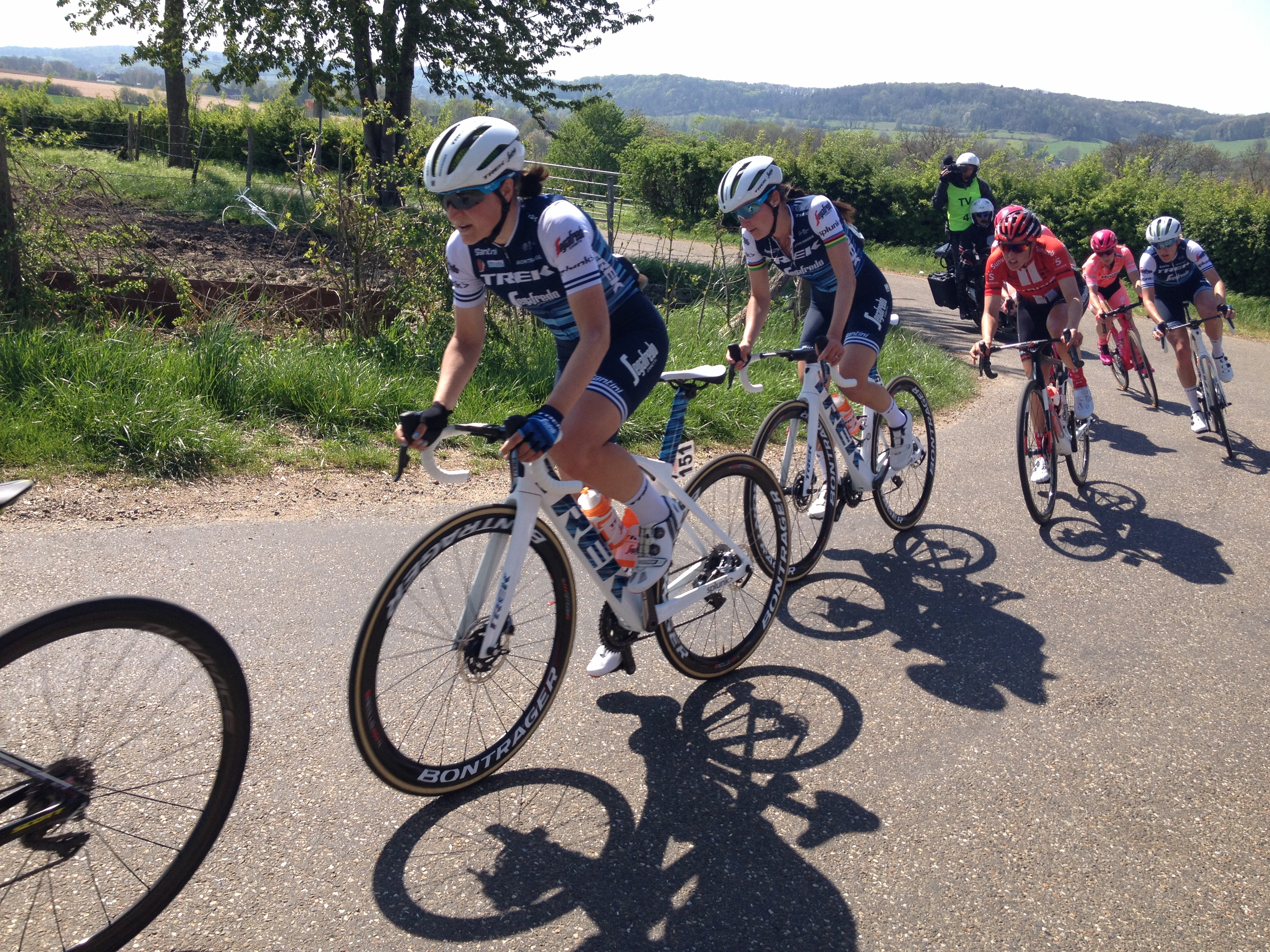 Amstel Gold Race Ladies Edition 2019 op de Fromberg